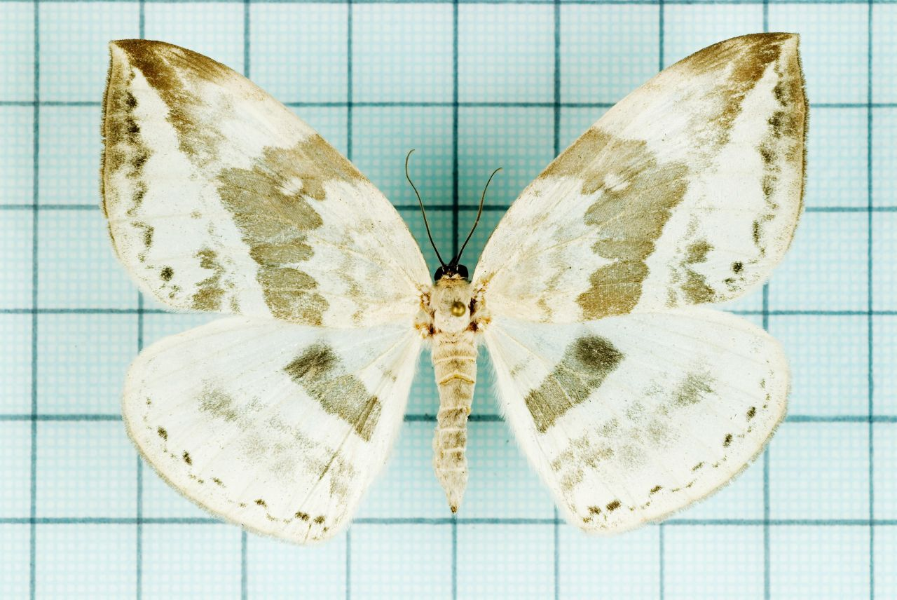 Cyclidia substigmaria (Hubuer,[1831]) 圓翅大鉤蛾 認識台灣的昆蟲10:P.20 female